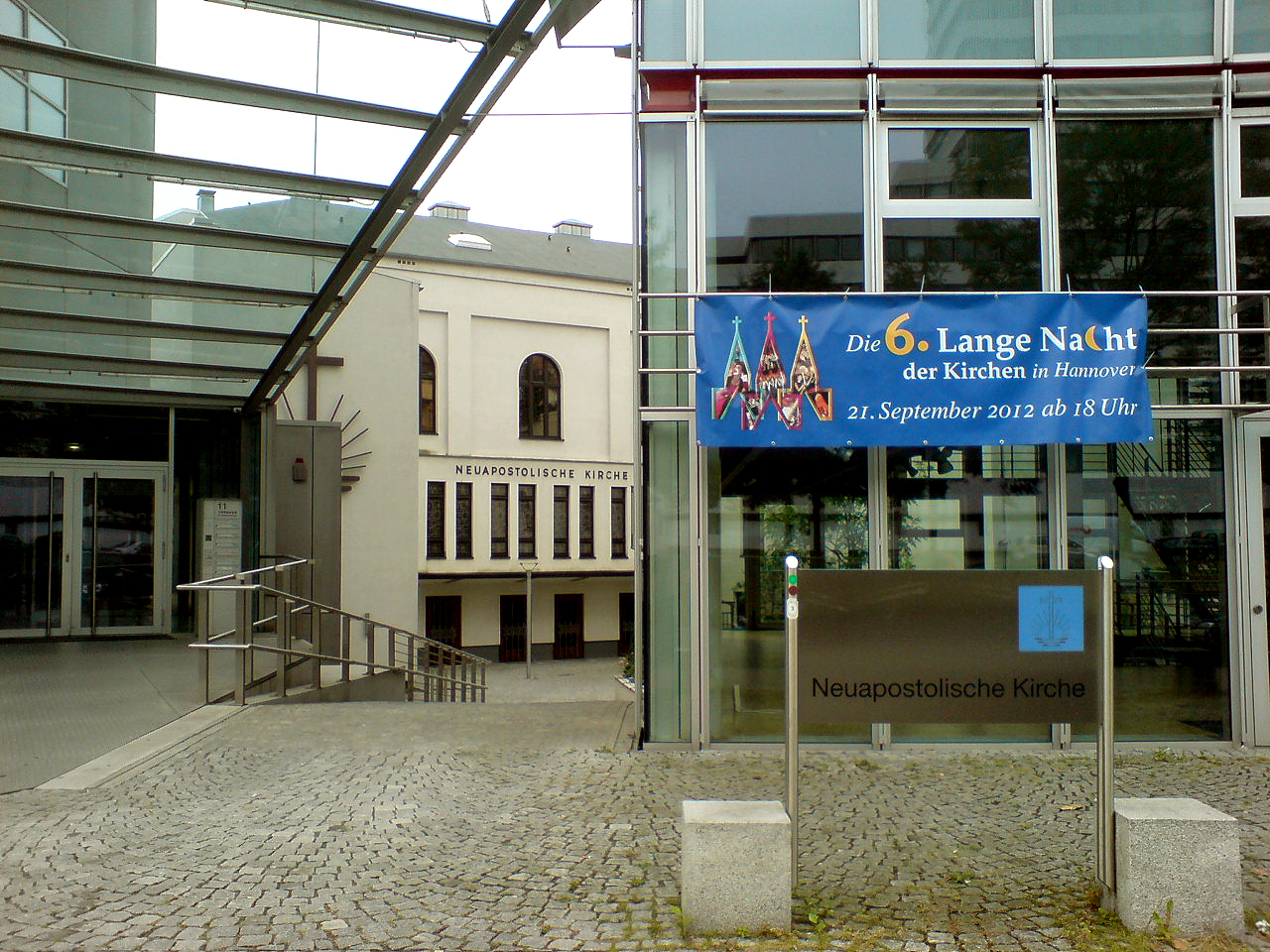 Zum sechsten Mal öffnet ein Großteil der Gotteshäuser in Hannover 2012 die Tür während der Langen Nacht der Kirchen. Das Foto zeigt ein aufgespanntes Transparent vor dem Zugang zur Neuapostolischen Kirche in Hannover-Mitte, Brühlstraße 11 A ...